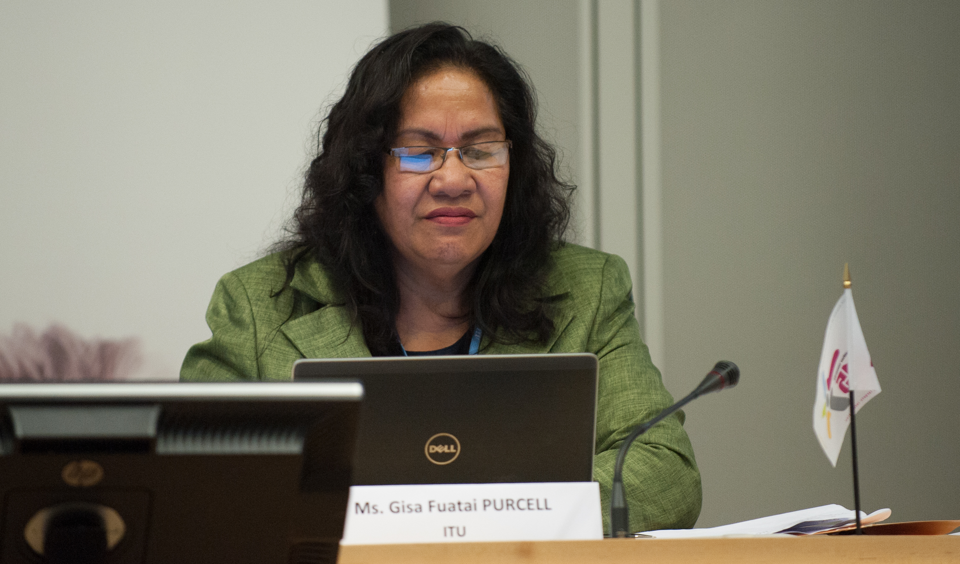 Ms Gita Fuatai Percell, ITU